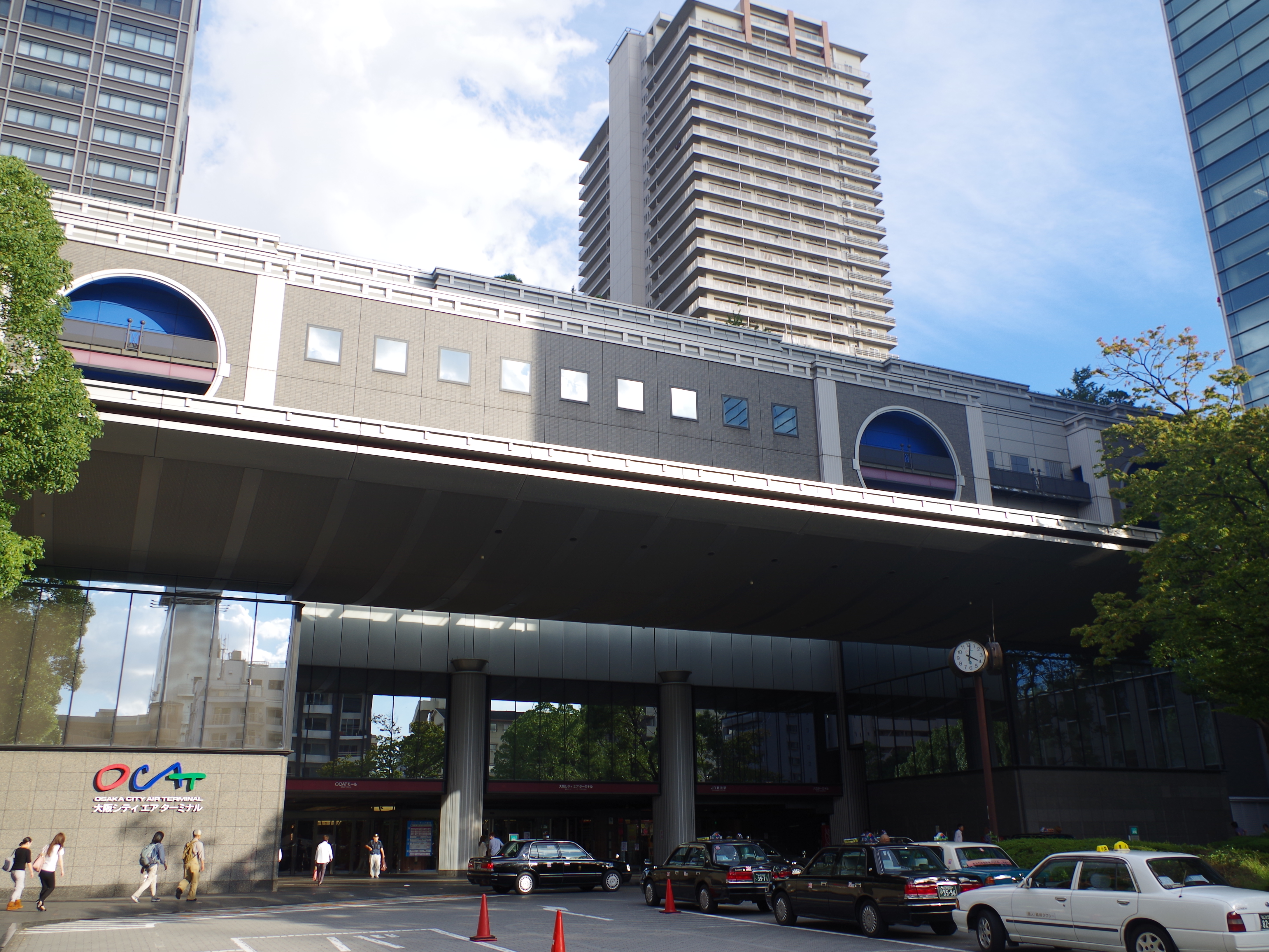 大阪シティエアターミナル OCAT: Osaka City Air Terminal 2012.10.09